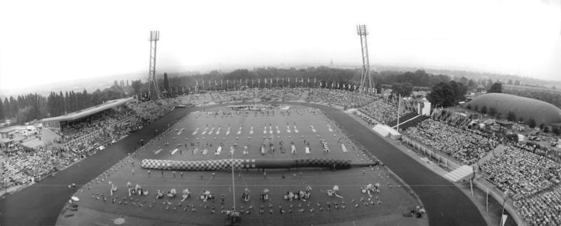 Chemnitz, Sportstadion, Pioniertreffen ADN-ZB Kasper 17.8.88 Karl-Marx-Stadt: VIII Pioniertreffen- Mit dem Entzünden der Flamme und einem bunten Programm unter dem Motto "Geh voran Pionier!" wird das VIII. Pioniertreffen in Karl-Marx-Stadt feierlich erönnen. (Foto von der Generalprobe)